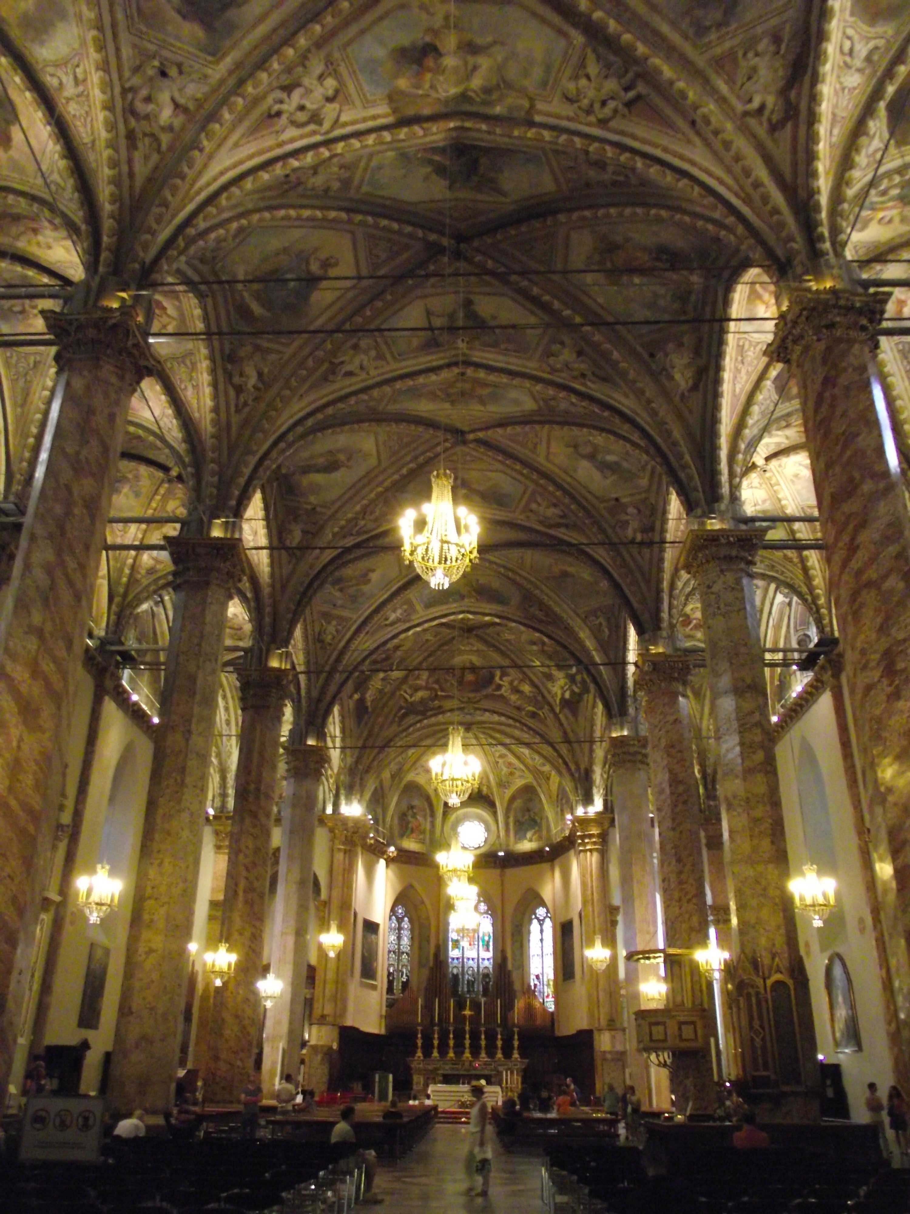 Perugia, Interno del Duomo